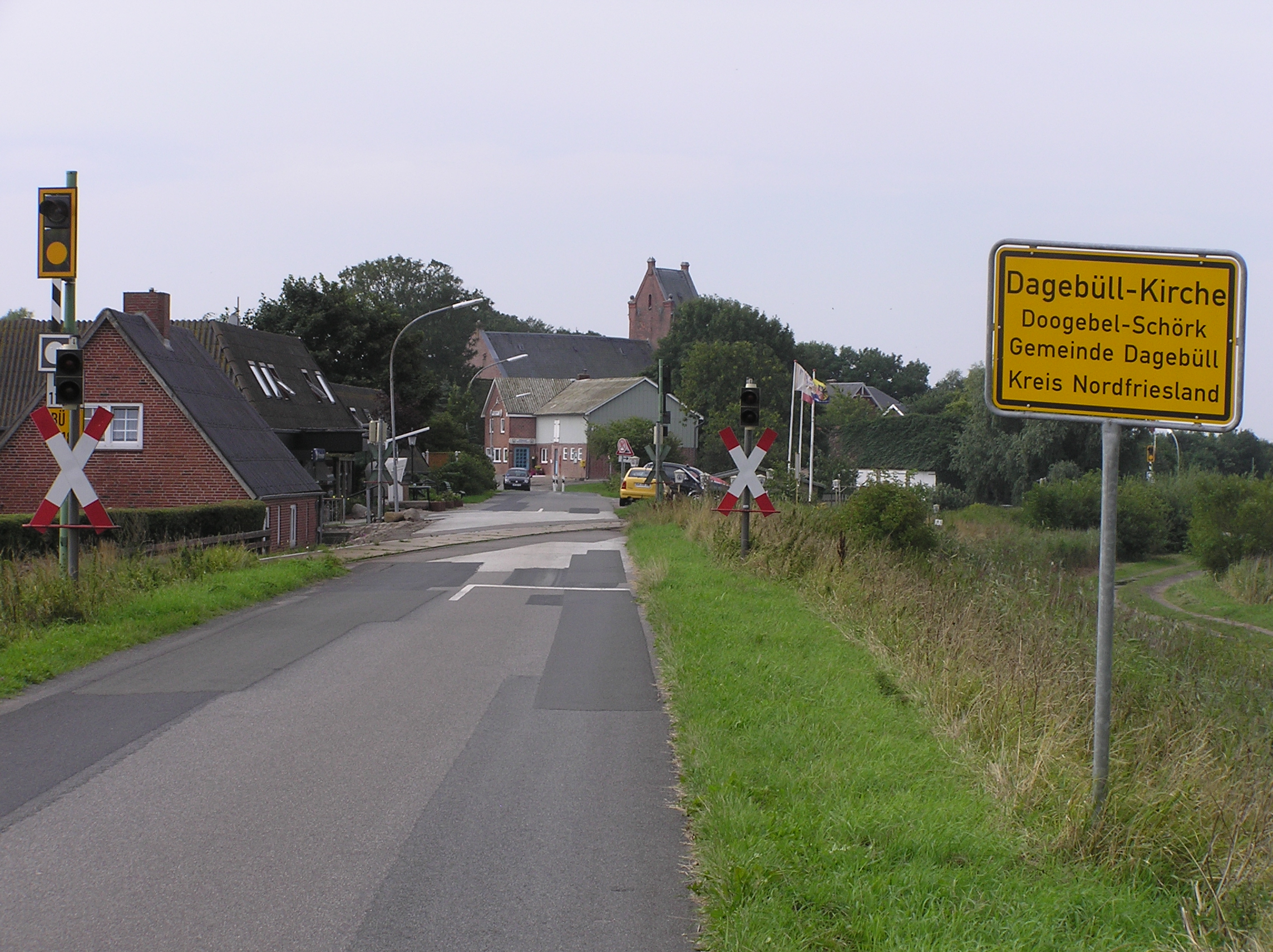 Dagebüll Kirche, Nordfriesland, Germany